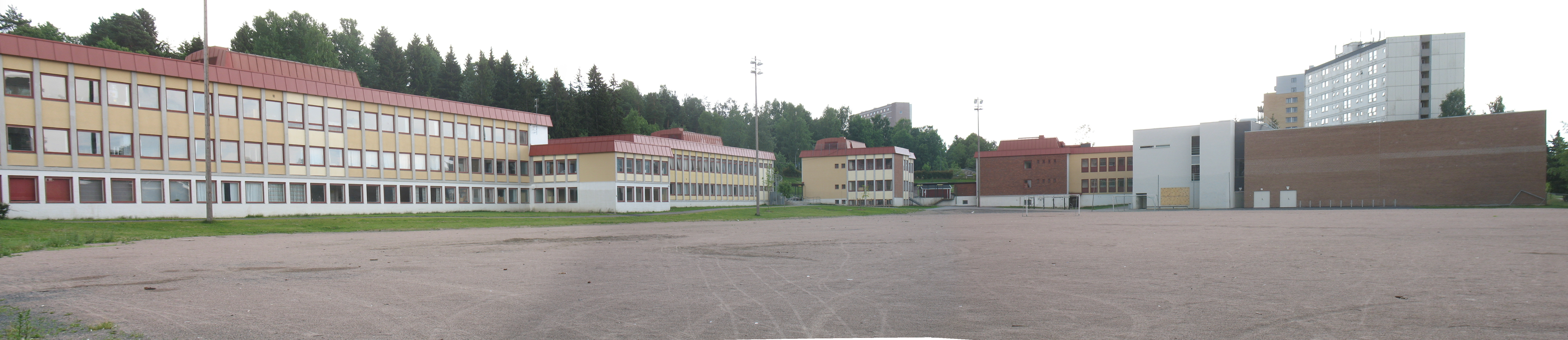 Bøler skole i Oslo